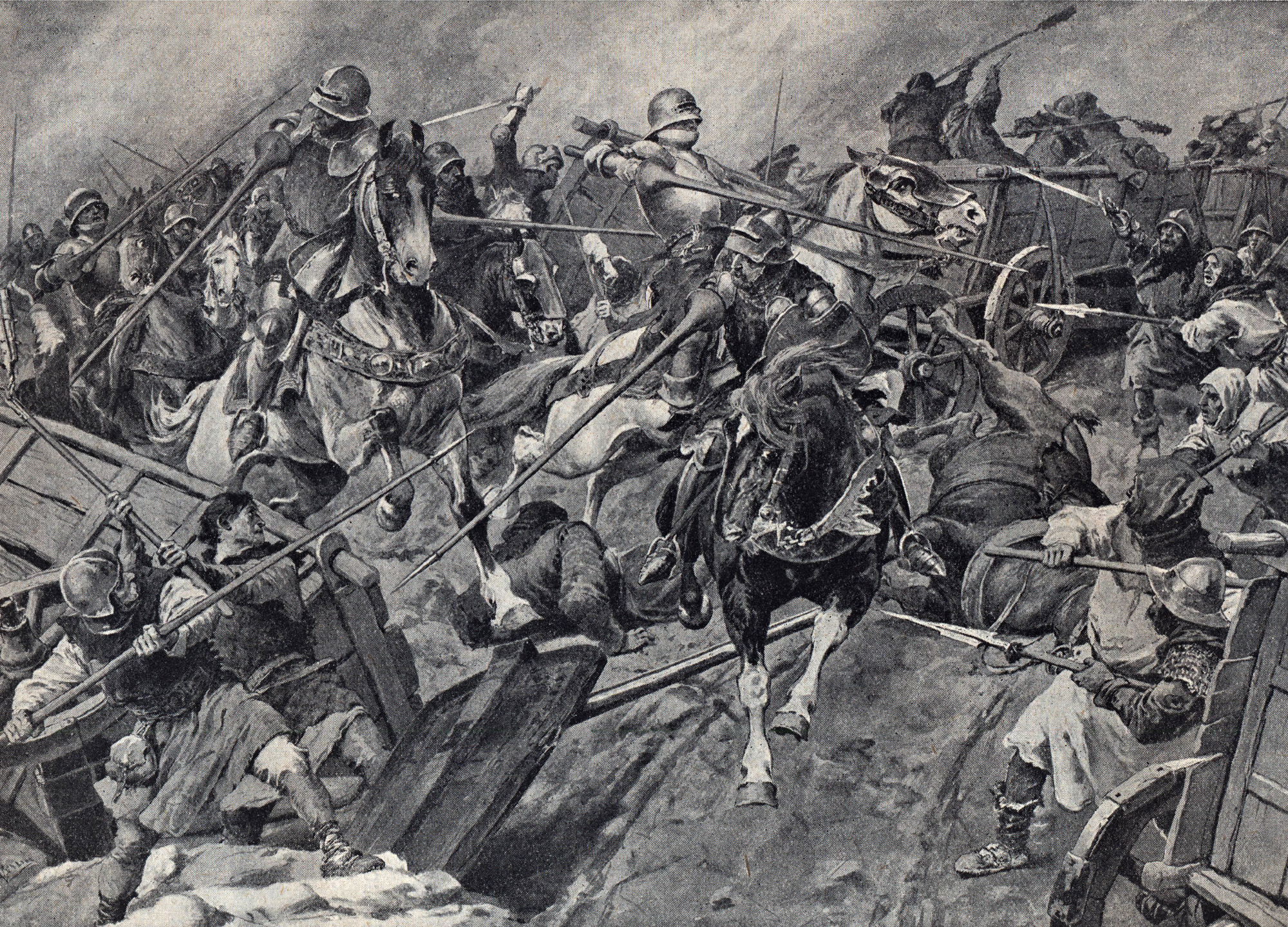 Rozražení vozové hradby radikálů jízdním oddílem, který tvořili šlechtici z řad někdejších táborských spojenců, mezi nimiž byli například Jan Malovec z Pacova, Mikuláš z Landštejna nebo Arnošt z Leskova.